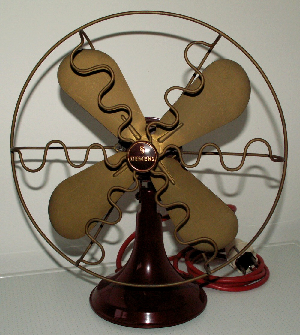 Ventilator Siemsens 1920